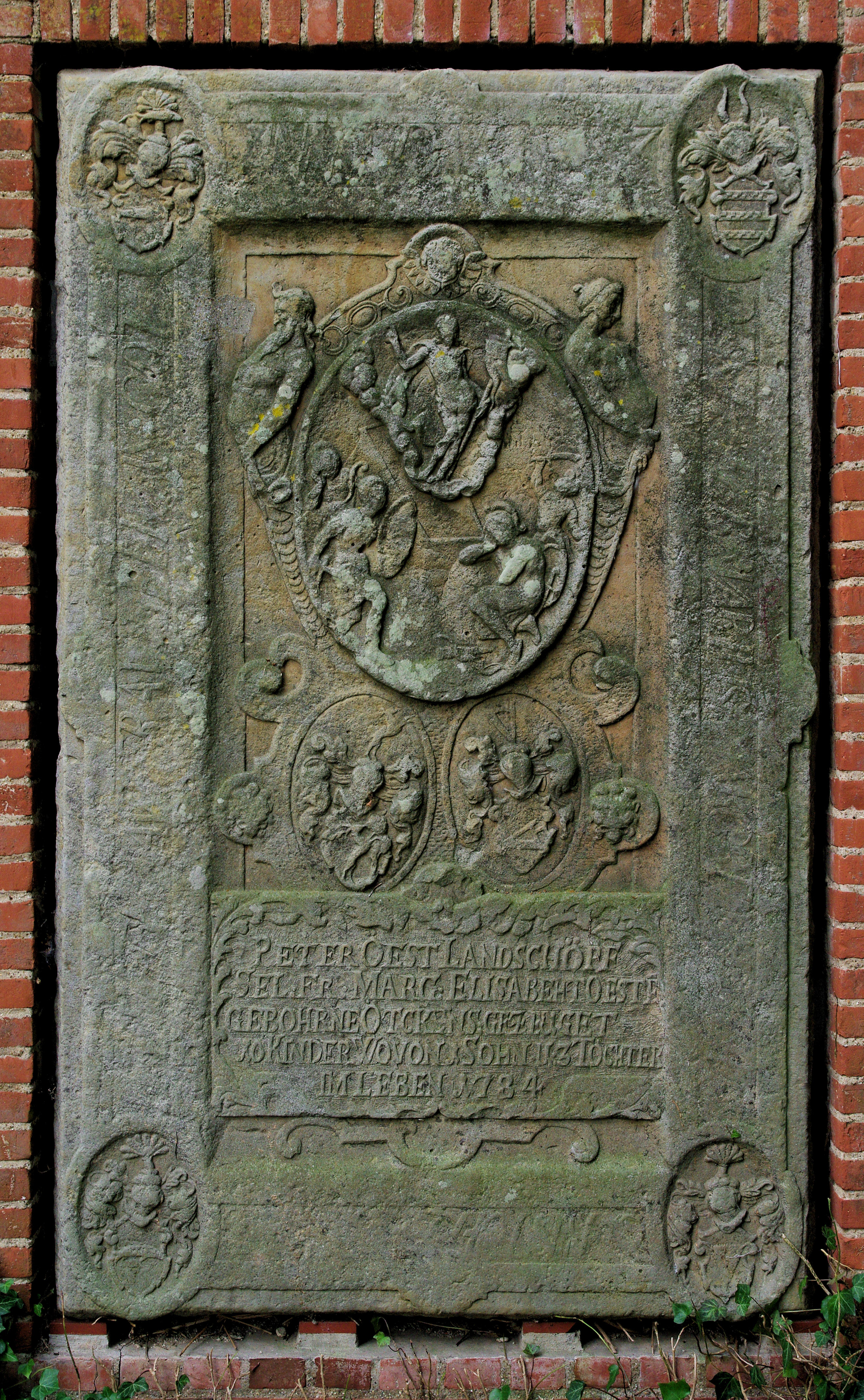 Grabstein, der in die Kirchenmauer eingelassen ist